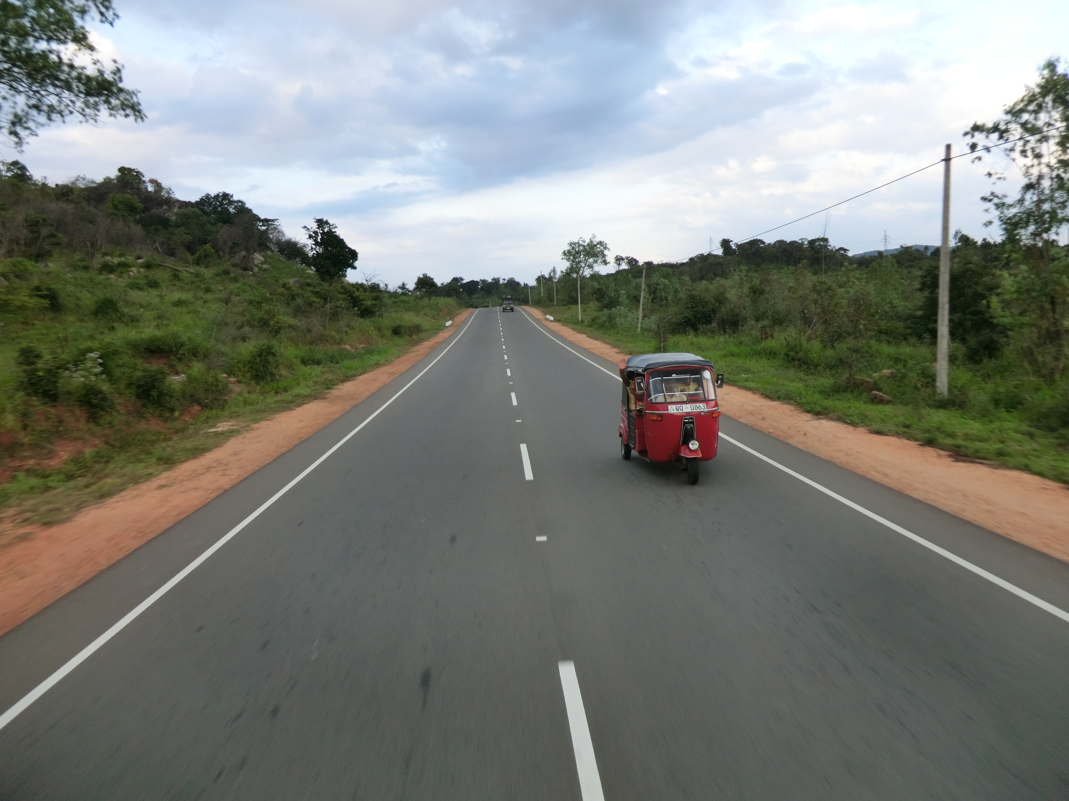 Polonnaruwa, Sri Lanka